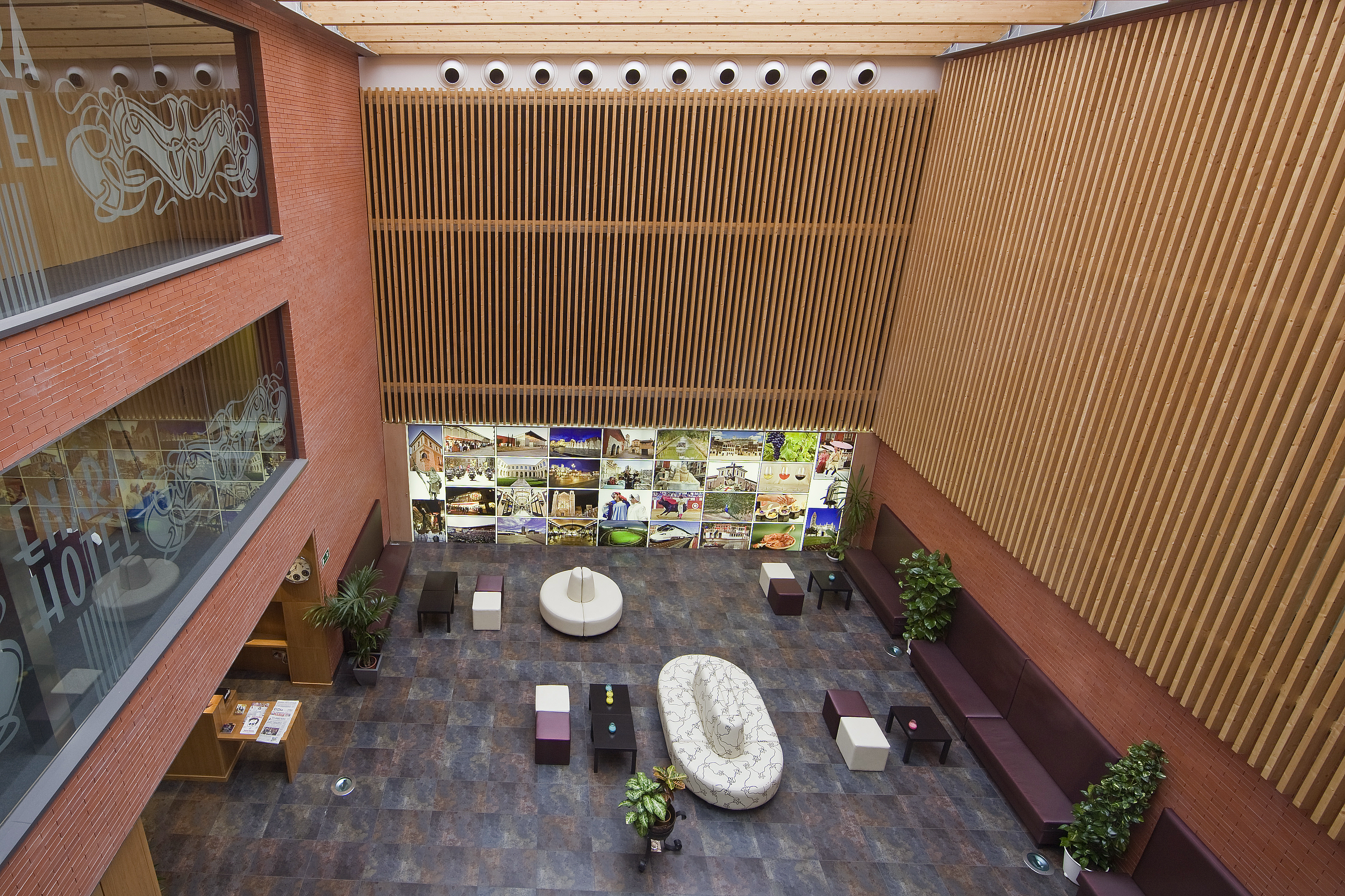 HotelEnara